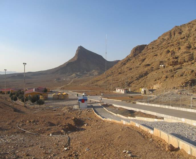 محوطه بیرونی غار در سال 1390